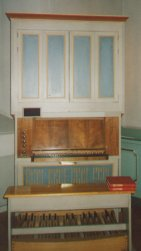 Kororgel i Lits kyrka